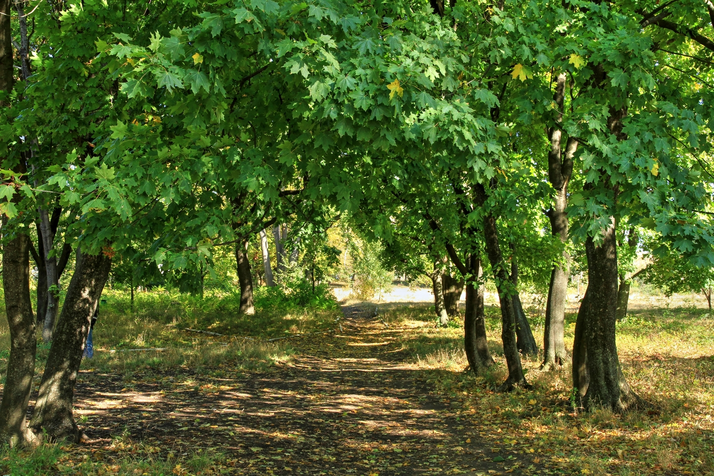 Милештский парк, монумент природы, находится в Ниспоренский район, с. Милешть (код MD-NS-map-016)